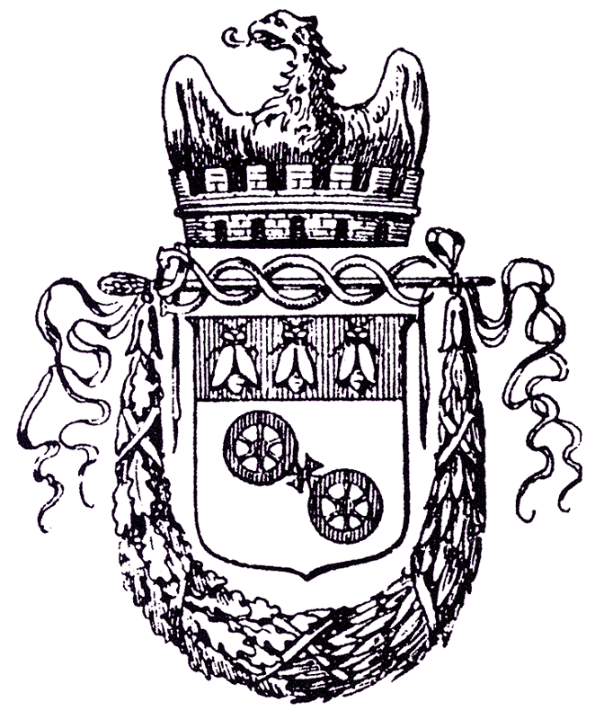 Von Napoleon am 13. Juni 1811 verliehenes Stadtwappen von Mainz Sonstiges